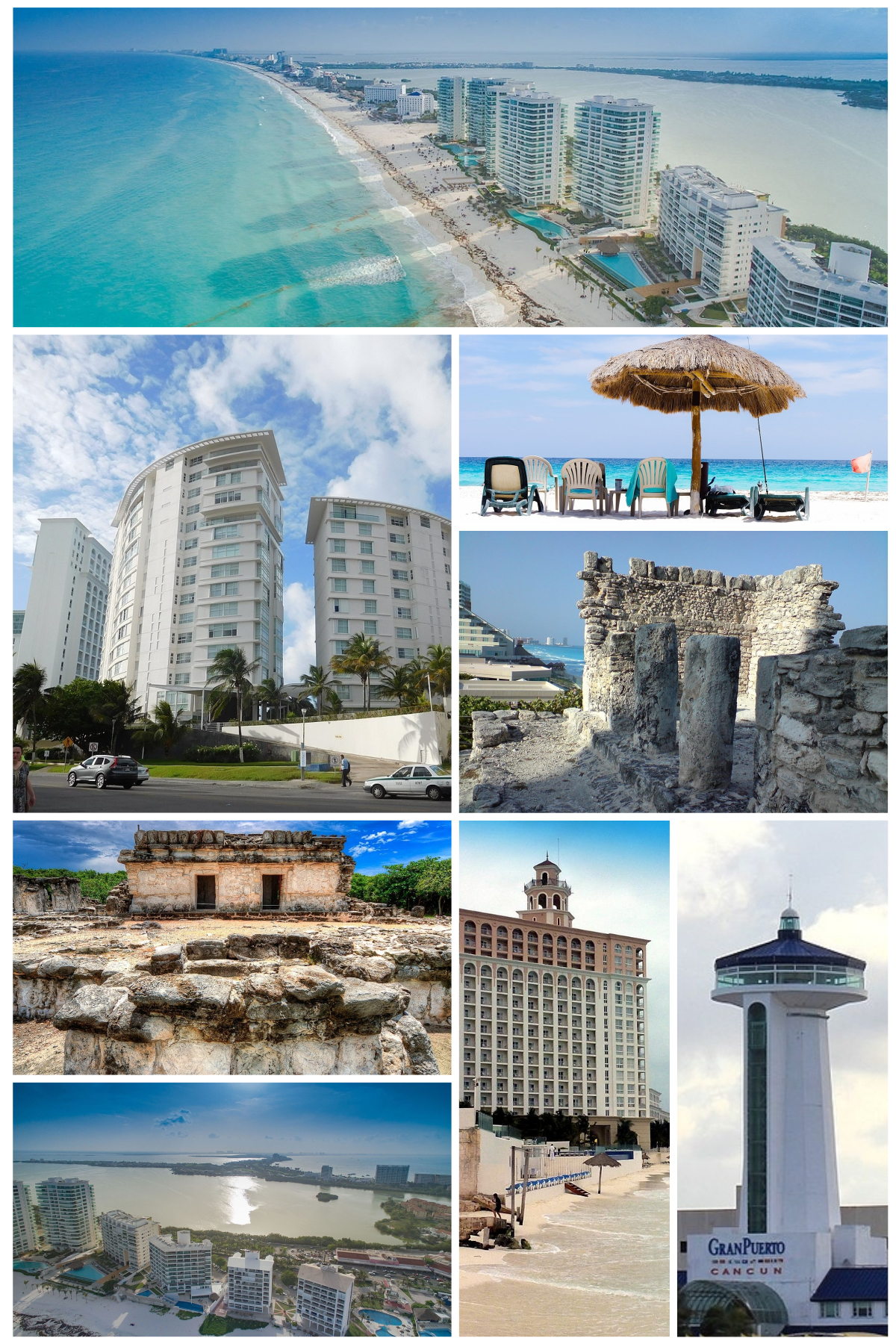 Cancún